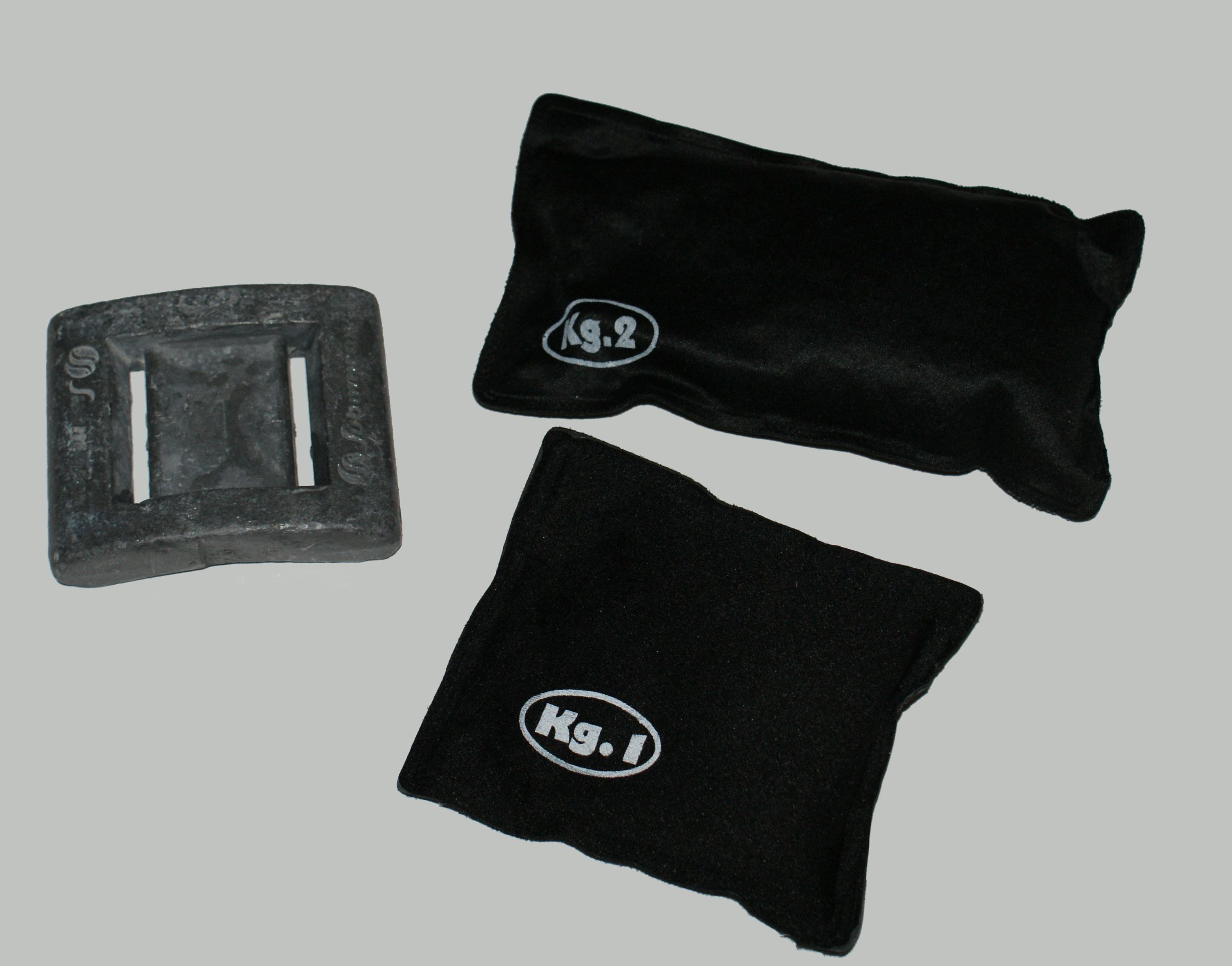 Soft- und Hartblei wie es von Tauchern verwendet wird.